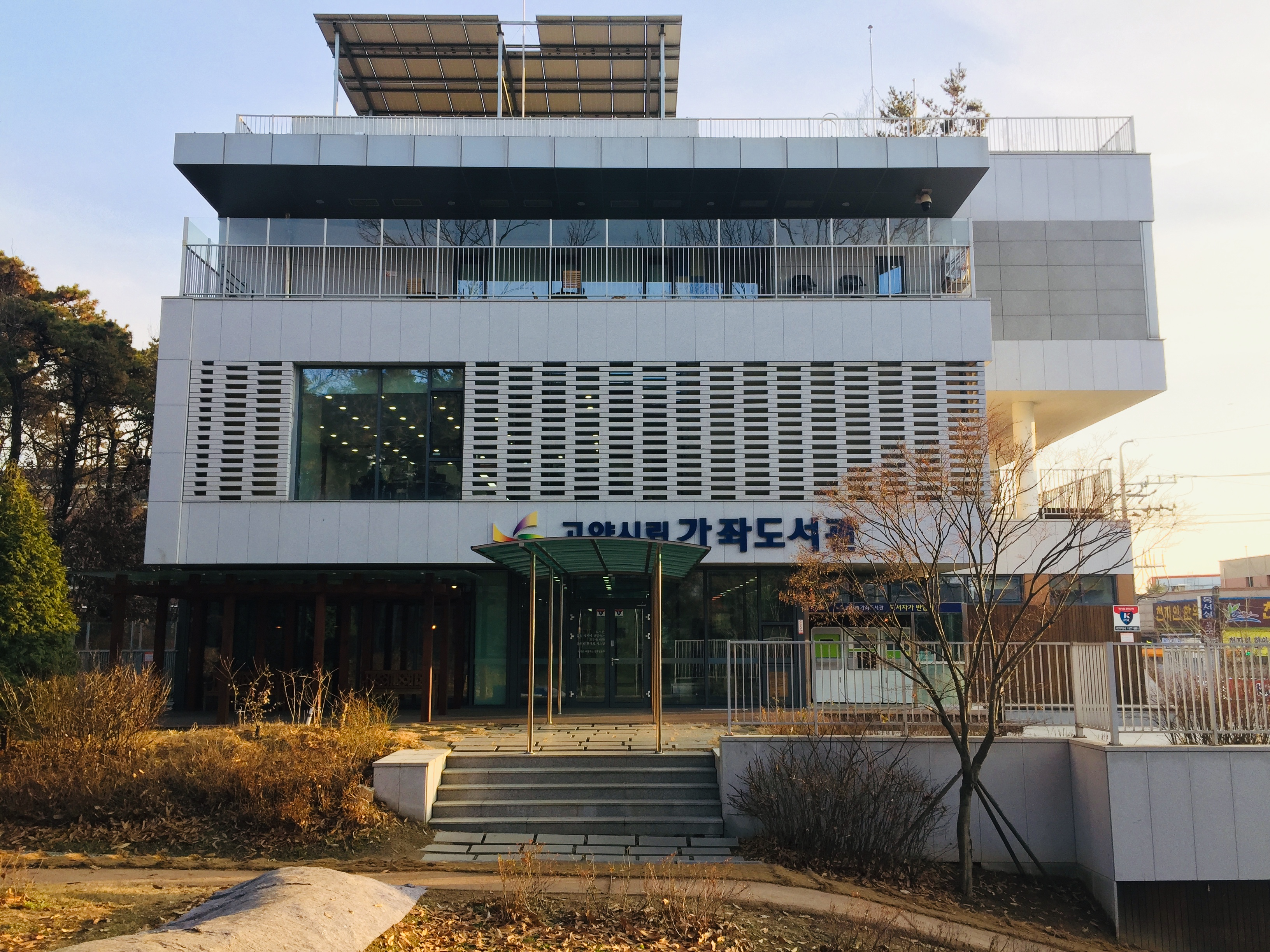 가좌도서관 전경